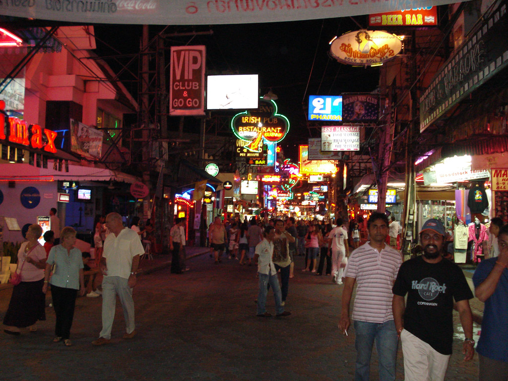 Pattaya w Tajlandii nocą.